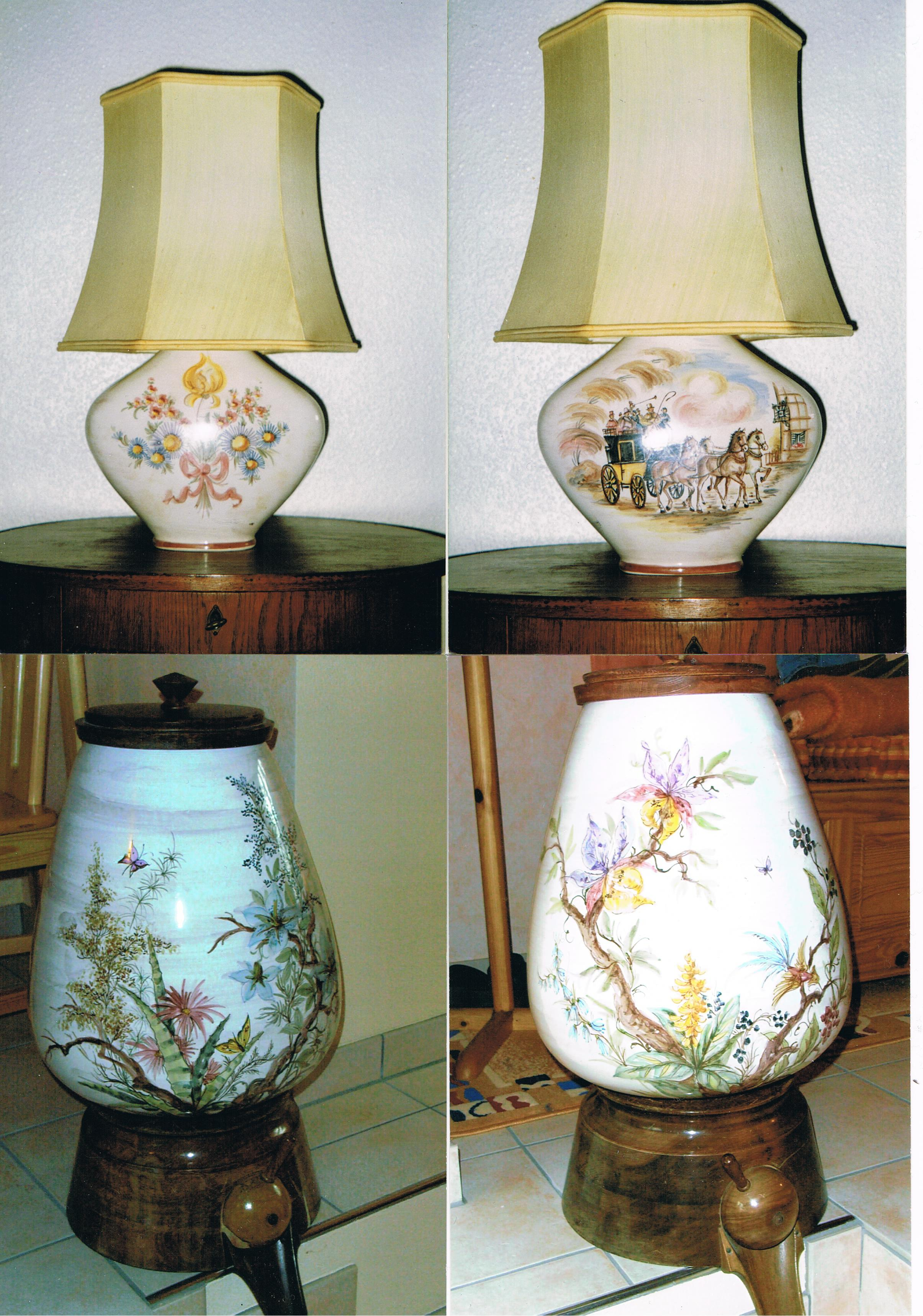 Tischlampenfuß in Form eines Bocksbeutels Dekor Vorderseite "Postkutsche", Rückseite "Biedermeiersträußchen", H 35 cm, 2. MZ, Entwurf Frau Eigler. Zwei Kaffee-Behälter (Kaffeeschütten) mit asiatischem Motiv, Fuß und Deckel Teak-Holz, Höhe "73 cm", MZ 2, Entwurf Herr Langner; alles von Ulmer Keramik